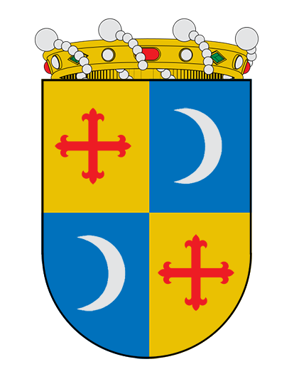 cuarteles primero y cuarto de oro con una cruz floreteada de gules; segundo y tercer cuartel de azur con unos crecientes de plata Perteneciente a la familia Ric